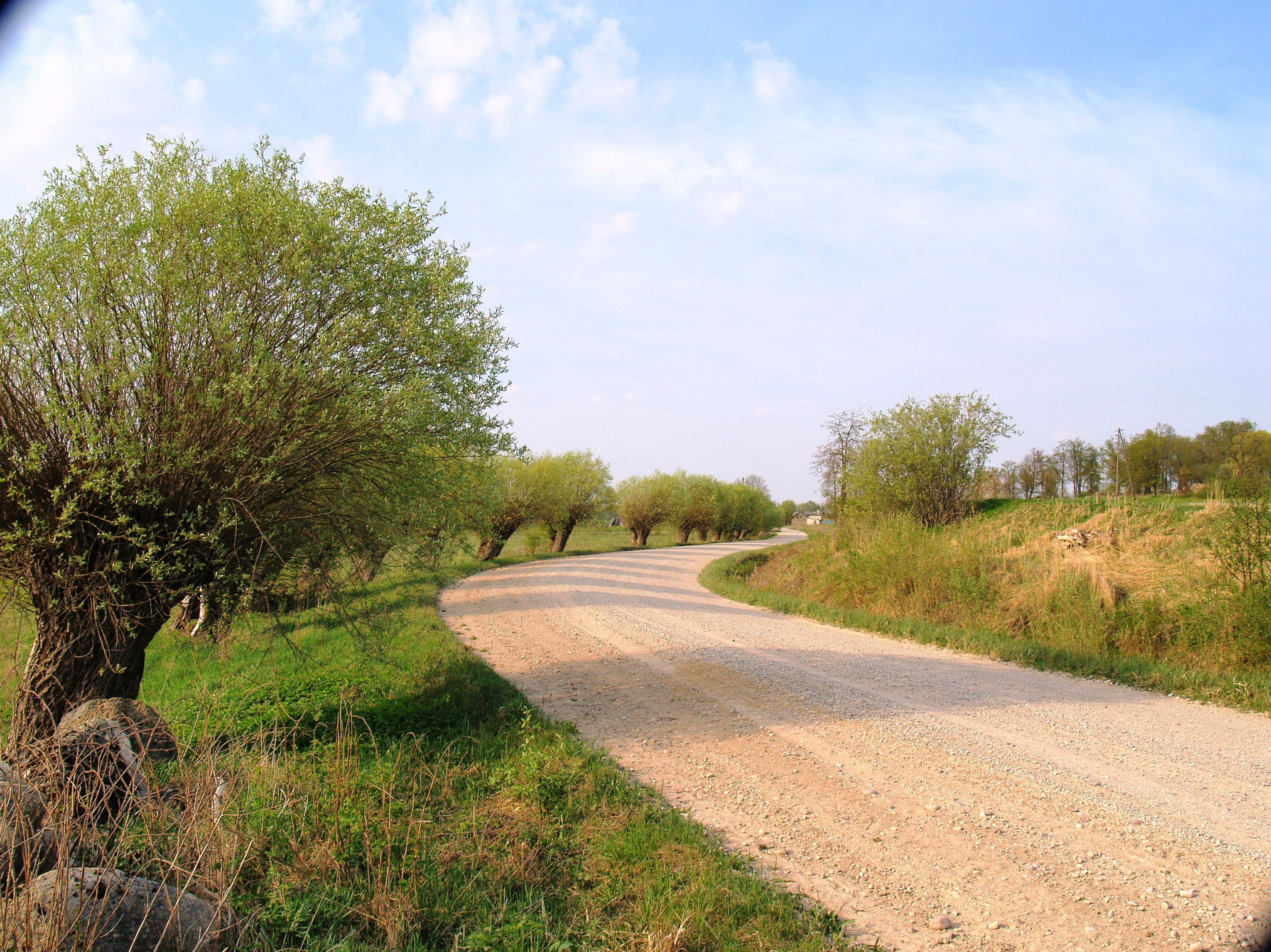 Ceļš pie Oksles (Road along Oksle)